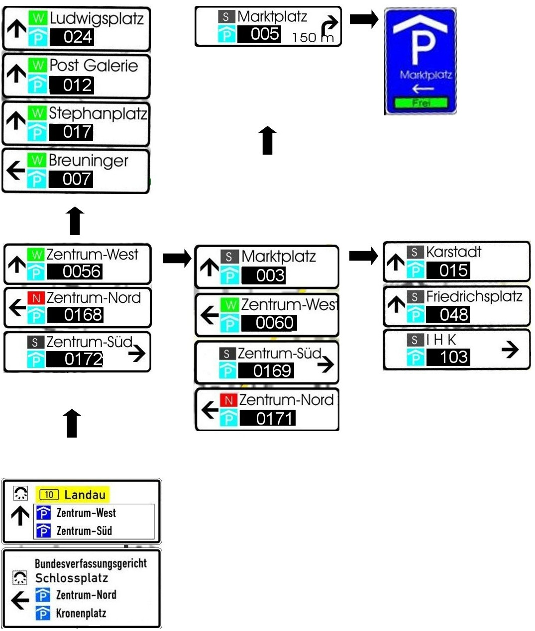 Schematische Darstellung eines Parkleitsystems.